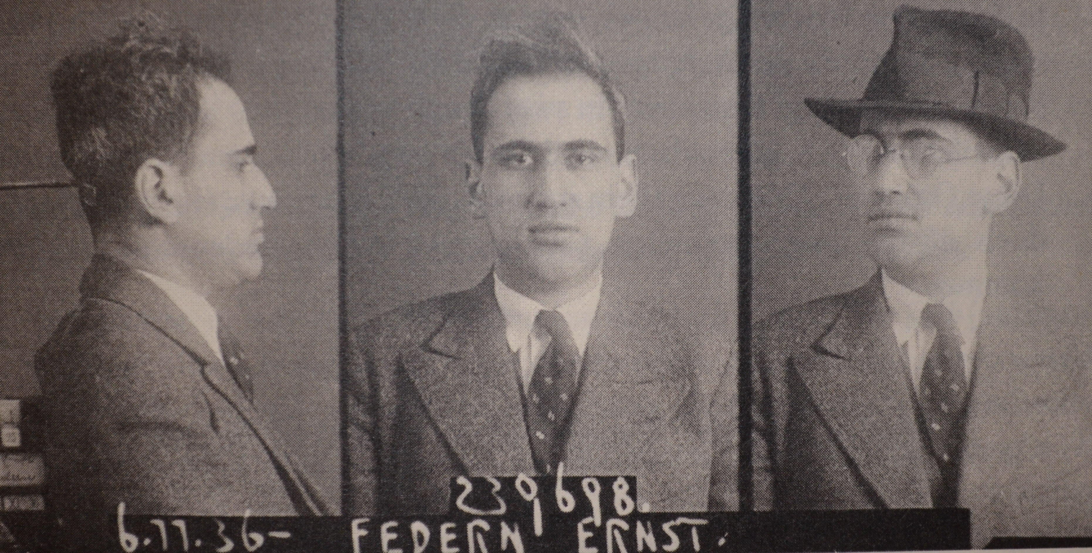 Ernst Federn, Foto der Österreichischen Staatspolizei, 6.11.1936, in Privatbesitz von Dnalor_01. Auch in: Dokumentationsarchiv des österreichischen Widerstandes, Altes Rathaus, Wipplingerstr.6-8 A-1010 Wien. Das Bild wurde ebenso verwendet und veröffentlicht im Buch: Bernhard Kuschey: Ernst und Hilde Federn. Die Ausnahme des Überlebens. Ernst und Hilde Federn. Eine biographische Studie und eine Analyse der Binnenstrukturen des Konzentrationslagers. Psychosozial-Verlag, Gießen 2003, ISBN 3-89806-173-6, auf der Seite 239. Die Österreichische Staatspolizei (StaPo): Der österreichische Staatspolizeiliche Dienst (StaPo), war als Vorläufer des Bundesamts für Verfassungsschutz und Terrorismusbekämpfung bis 2002 der Inlandsgeheimdienst des Bundesinnenministeriums. In der breiten Öffentlichkeit ist der Name „Stapo“ noch immer verbreitet.